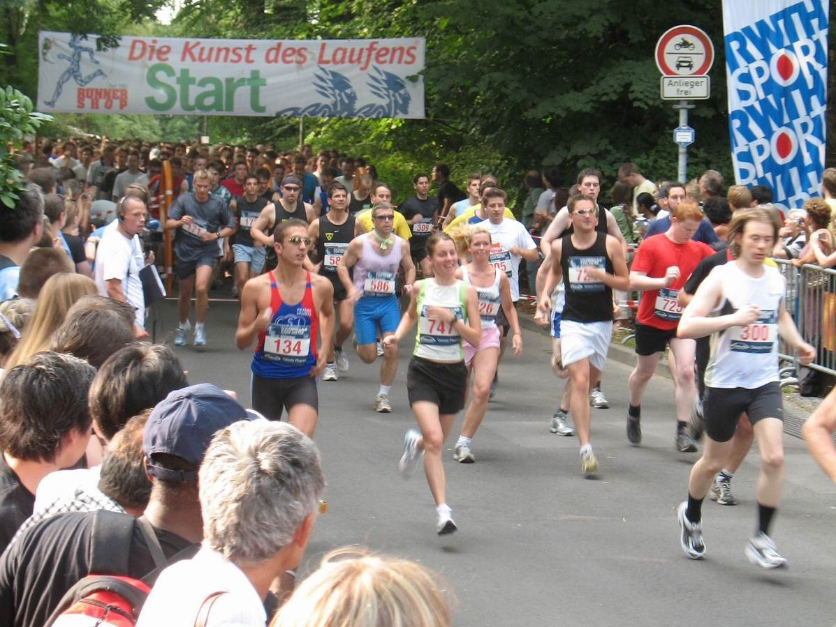 "Lousberglauf" in Aachen, Germany